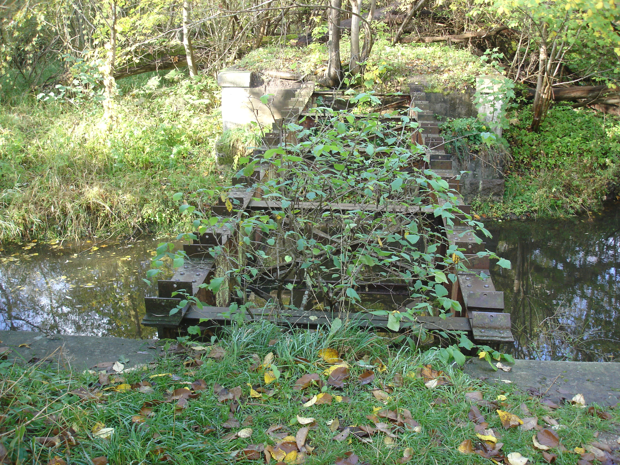 Brofundament hvor Køge-Ringsted-banen krydsede Køge Å